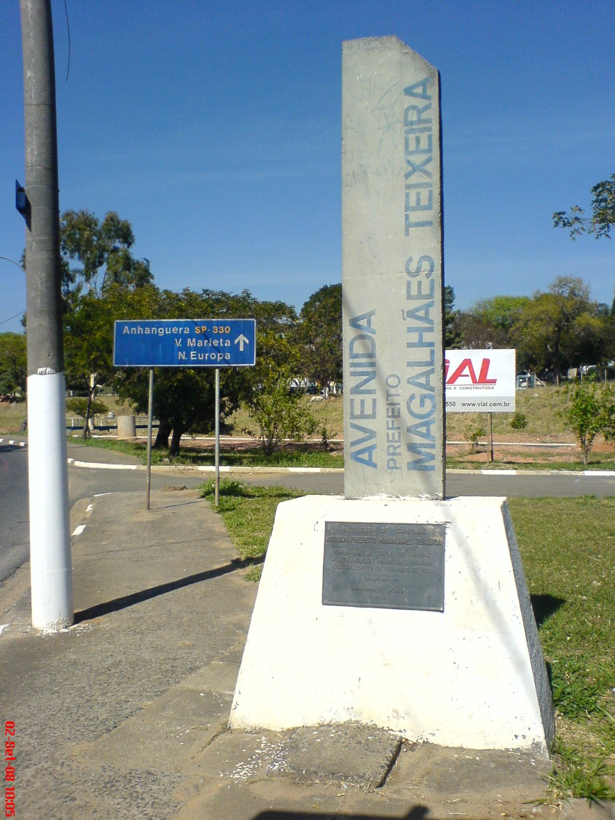 Av Pref Magalhães Teixeira, nome em homenagem ao Ex-Prefeito de Campinas que faleceu em 1996.